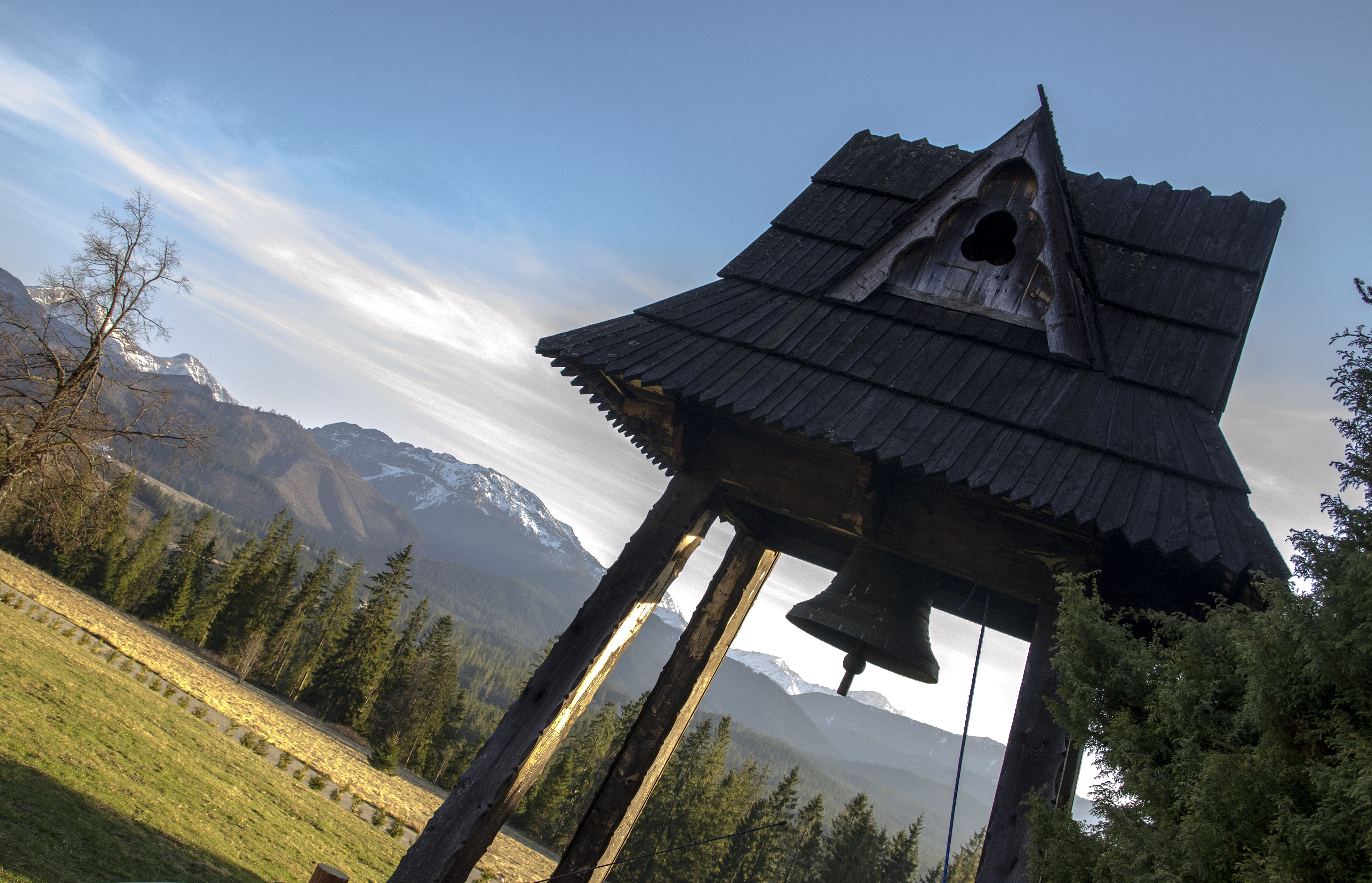 Dzwonnica przy kaplicy św. Anny na Płazówce